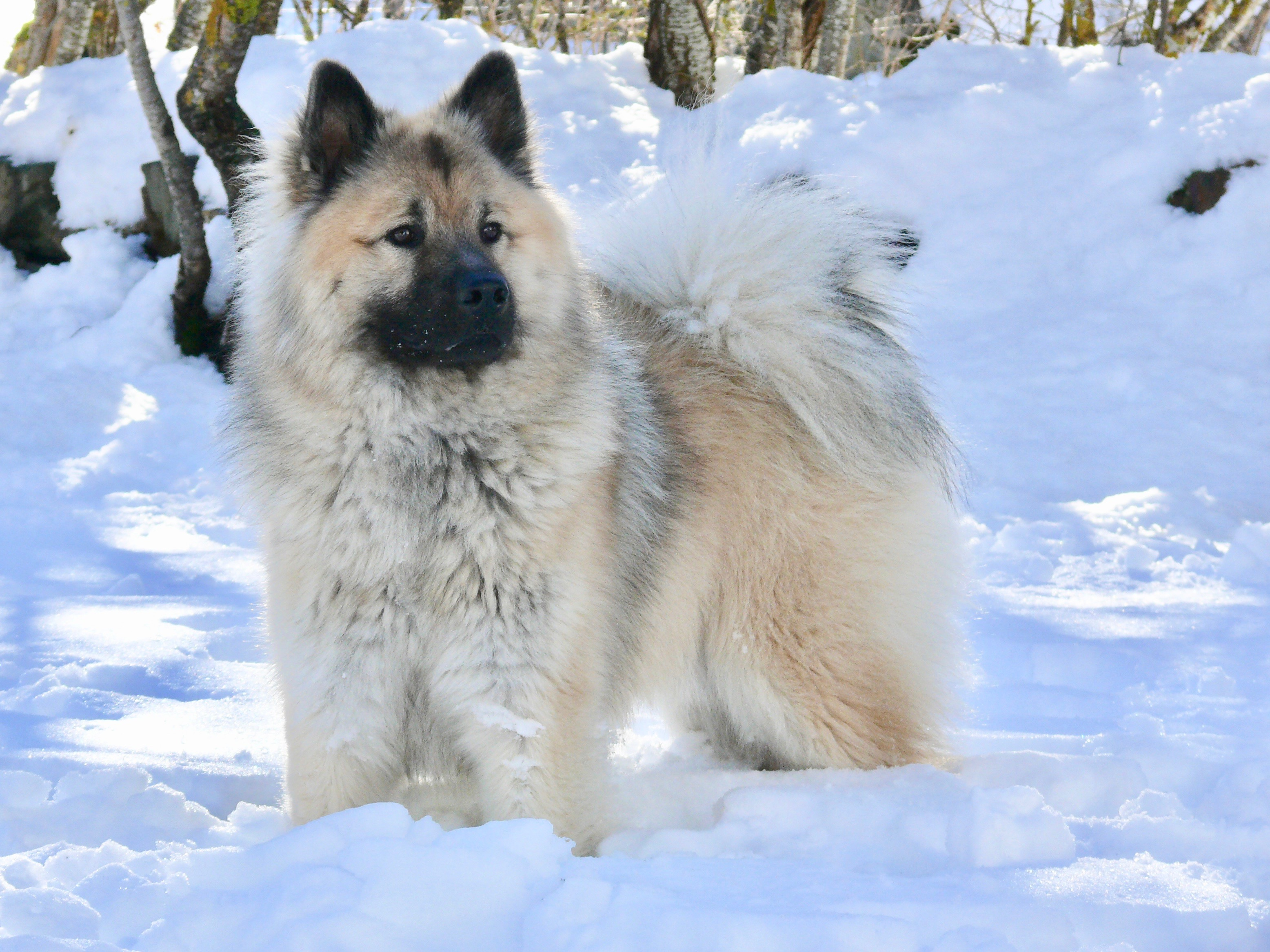 Eurasier Name: Kai de Eurasipomer. Born name: Selly de Eurasipomer. Father: Homer du Soleil Déurasie. Mother: Sol de Eurasipomer.